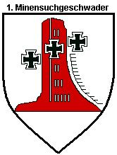 Wappen vom ersten Minensuchgeschwader